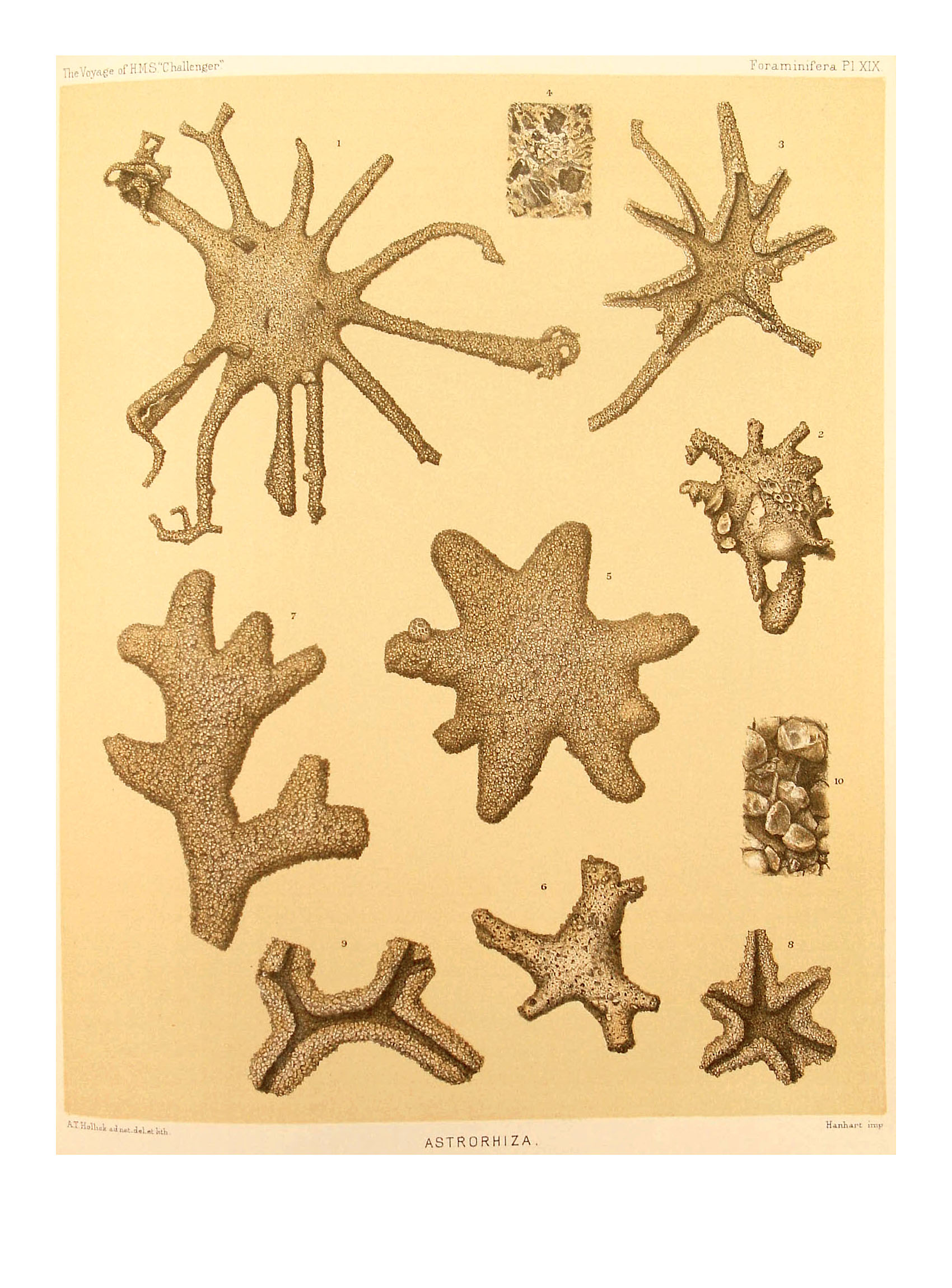 PLATE XIX. ASTRORHIZA. Figures 1-4. - Astrorhiza limicola, Sandahl Figs. 1, 2. Lateral aspect, Diam. x 8 Fig. 3. Specimen laid open to show the interior, Diam. x 8 Fig. 4. Portion of the test more highly magnified, to show the structure, x 100 Figures 5-10. - Astrorhiza arenaria, Norman Figs. 5-7. Specimens of different forms; lateral aspect, x 8 Figs. 8, 9. Specimens laid open to show the interior, x 8 Fig. 10. Portion of the surface more highly magnified, to show the constituent sand-grains, x 100